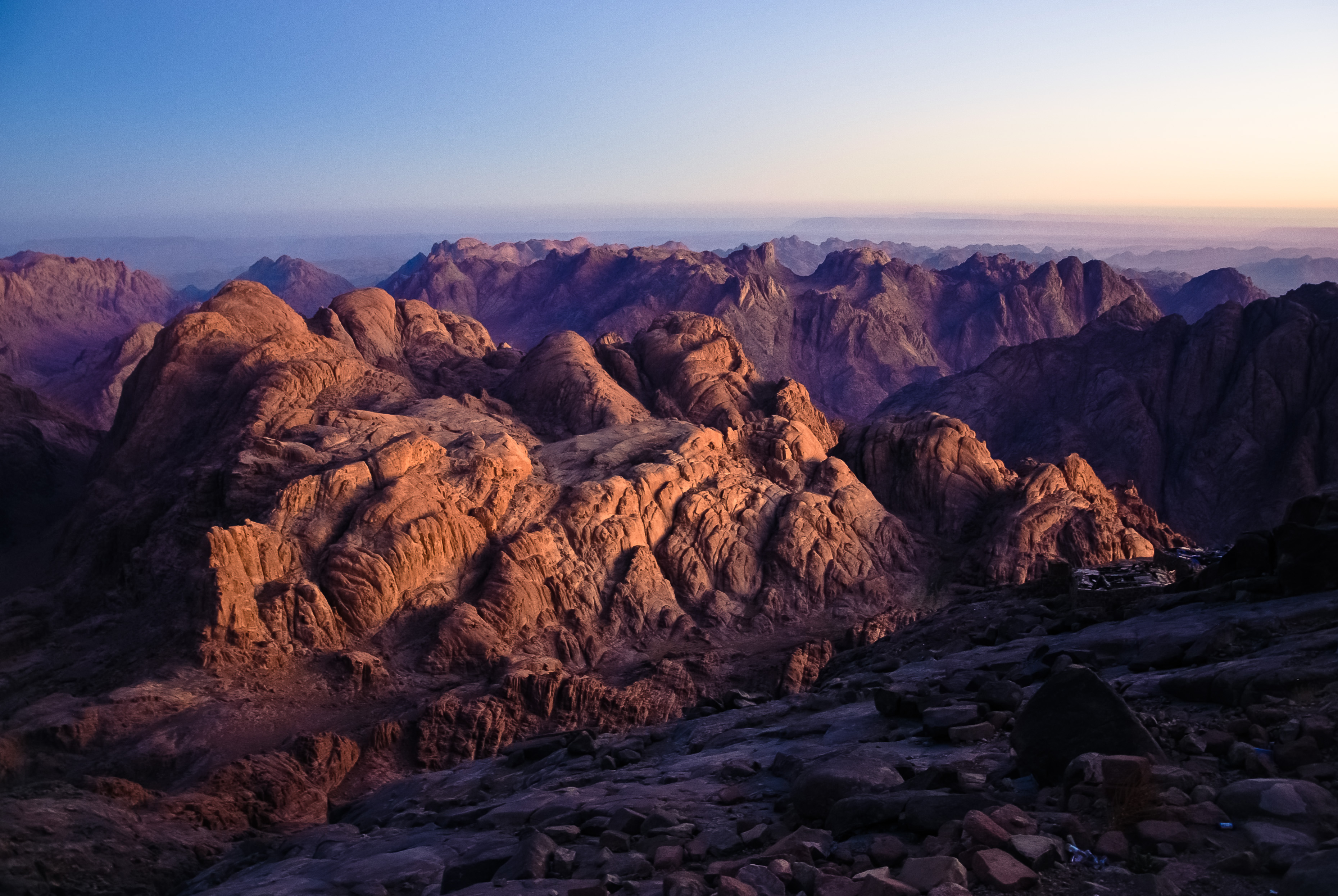 جبل موسي ويعرف كذلك باسم طور سيناء هو جبل يقع في محافظة جنوب سيناء في مصر. ويبلغ ارتفاعه 2285 مترا فوق سطح البحر، وسمي بجبل موسي نسبة لنبي الله موسي الذي كلم ربه في هذا الجبل وتلقي الوصايا العشر وفقا للديانات اليهودية والمسيحية والإسلام. يعتبر من أشهر جبال سيناء إذ يزوره الآلاف من السياح، فالناظر من أعلي الجبل يتمكن من رؤية مشاهد جميلة لسلسلة الجبال المحيطة خصوصا في فترتي شروق وغروب الشمس، ويقع قرب جبل كاترين، والذي يوجد به دير سانت كاترين، ويحيط بالجبل مجموعة من قمم جبال جنوب سيناء